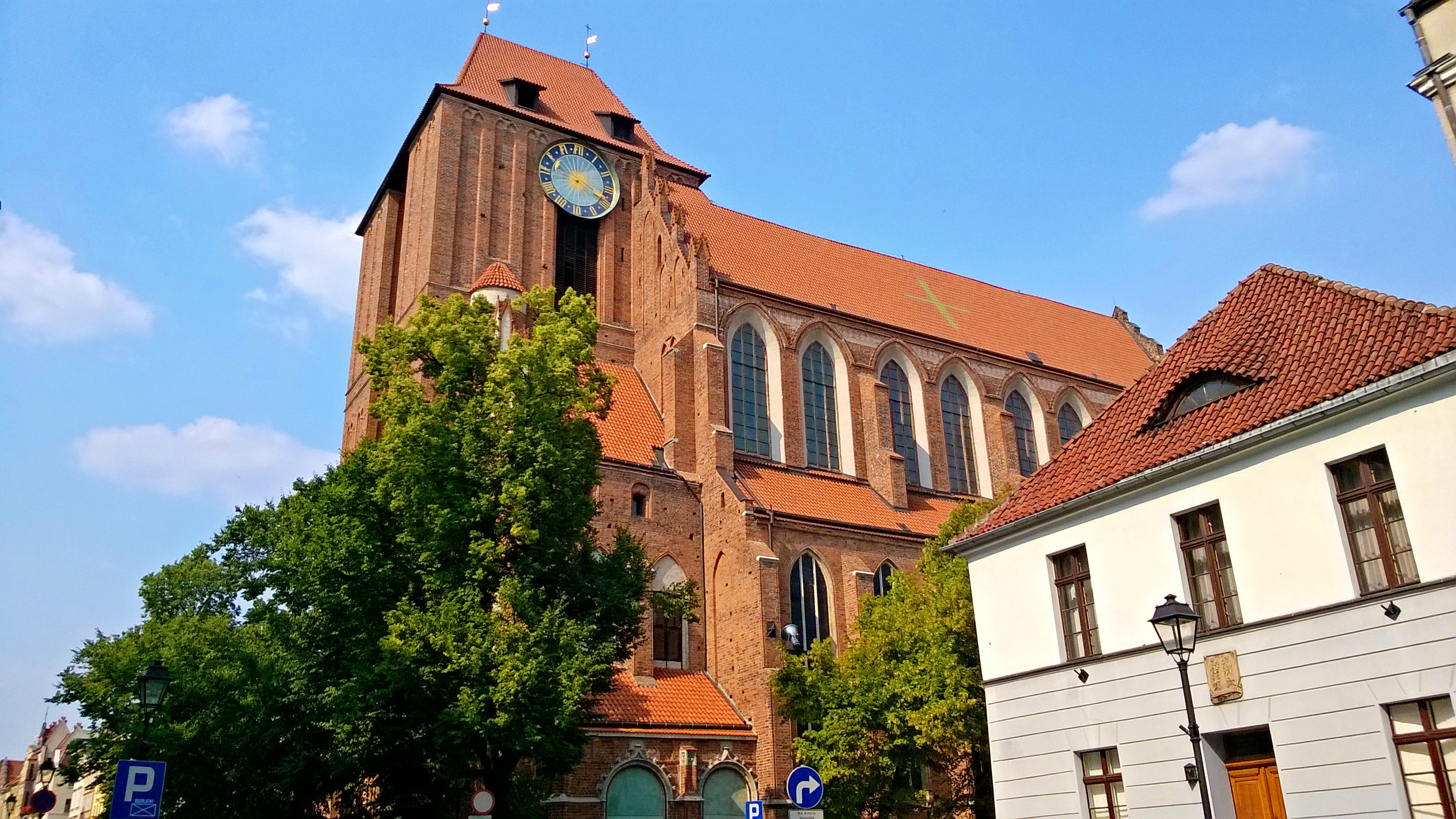 Bazylika katedralna w Toruniu